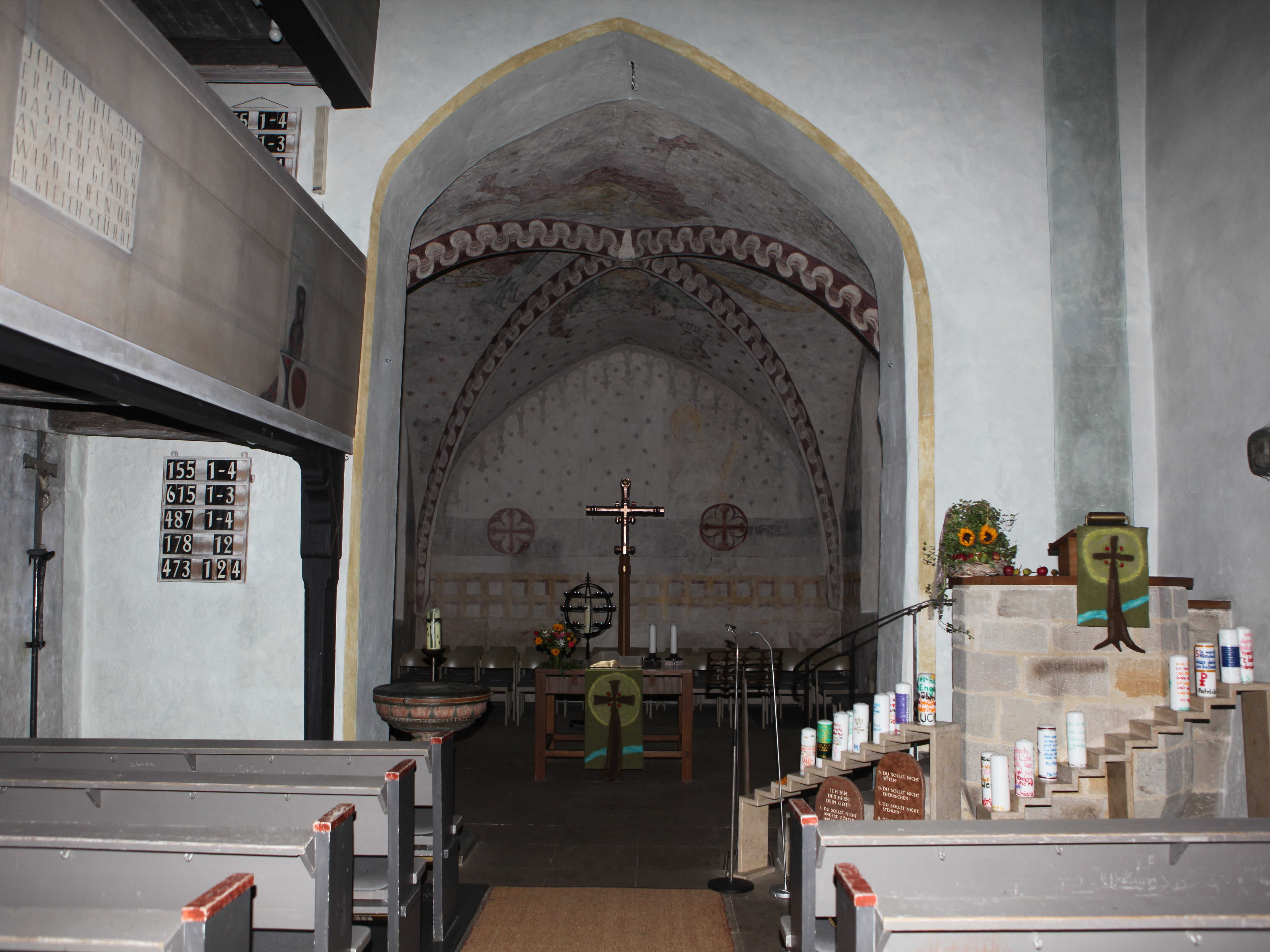 Evangelische Pfarrkirche St. Marien in Rödental, OT Einberg, Landkreis Coburg